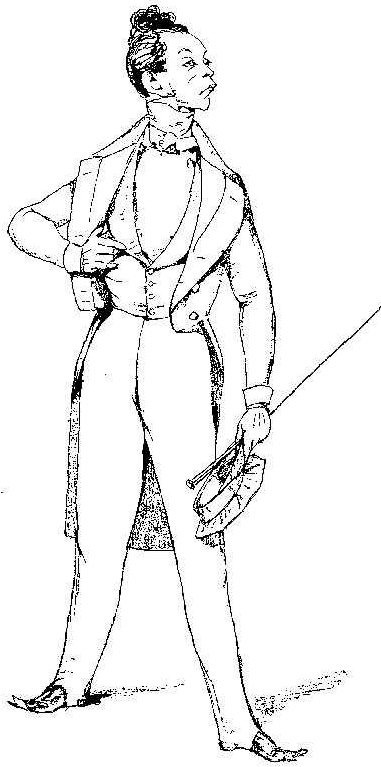 Иван Александрович Хлестаков